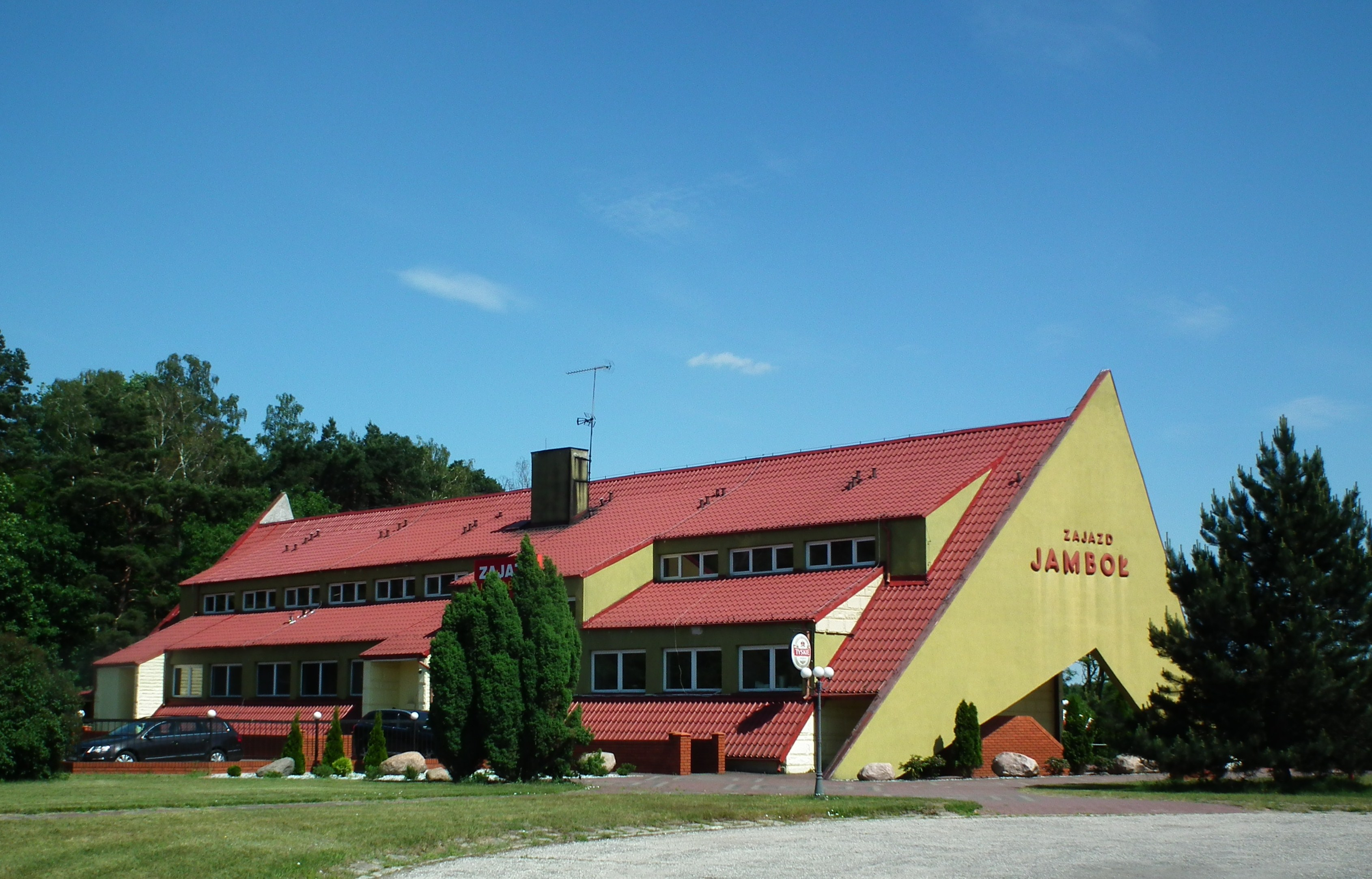 Zajazd Jamboł w Kolumnie.